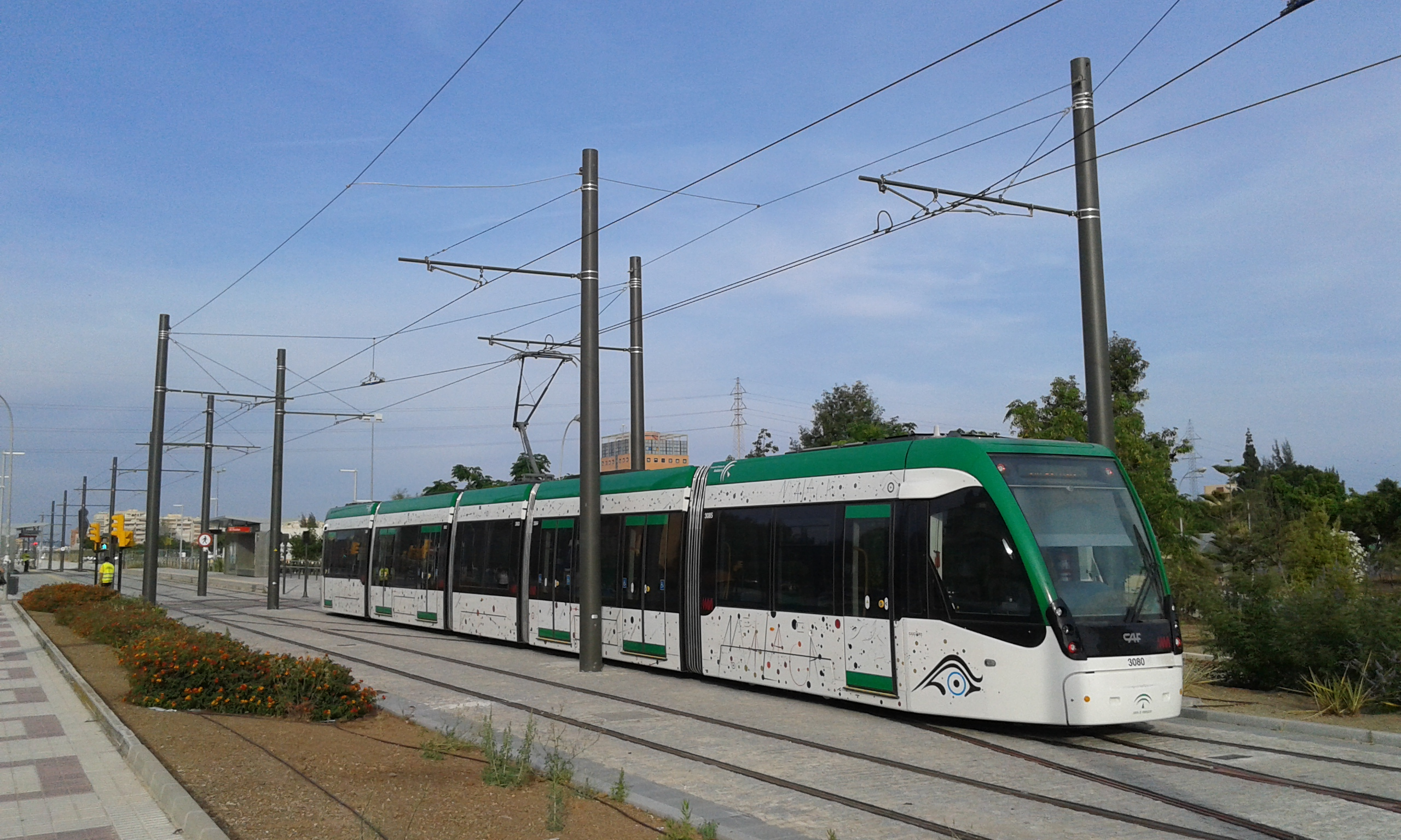 Convoy del Metro de Málaga en el Bulevar Louis Pasteur, cerca de la estación Universidad del Campus de Teatinos.